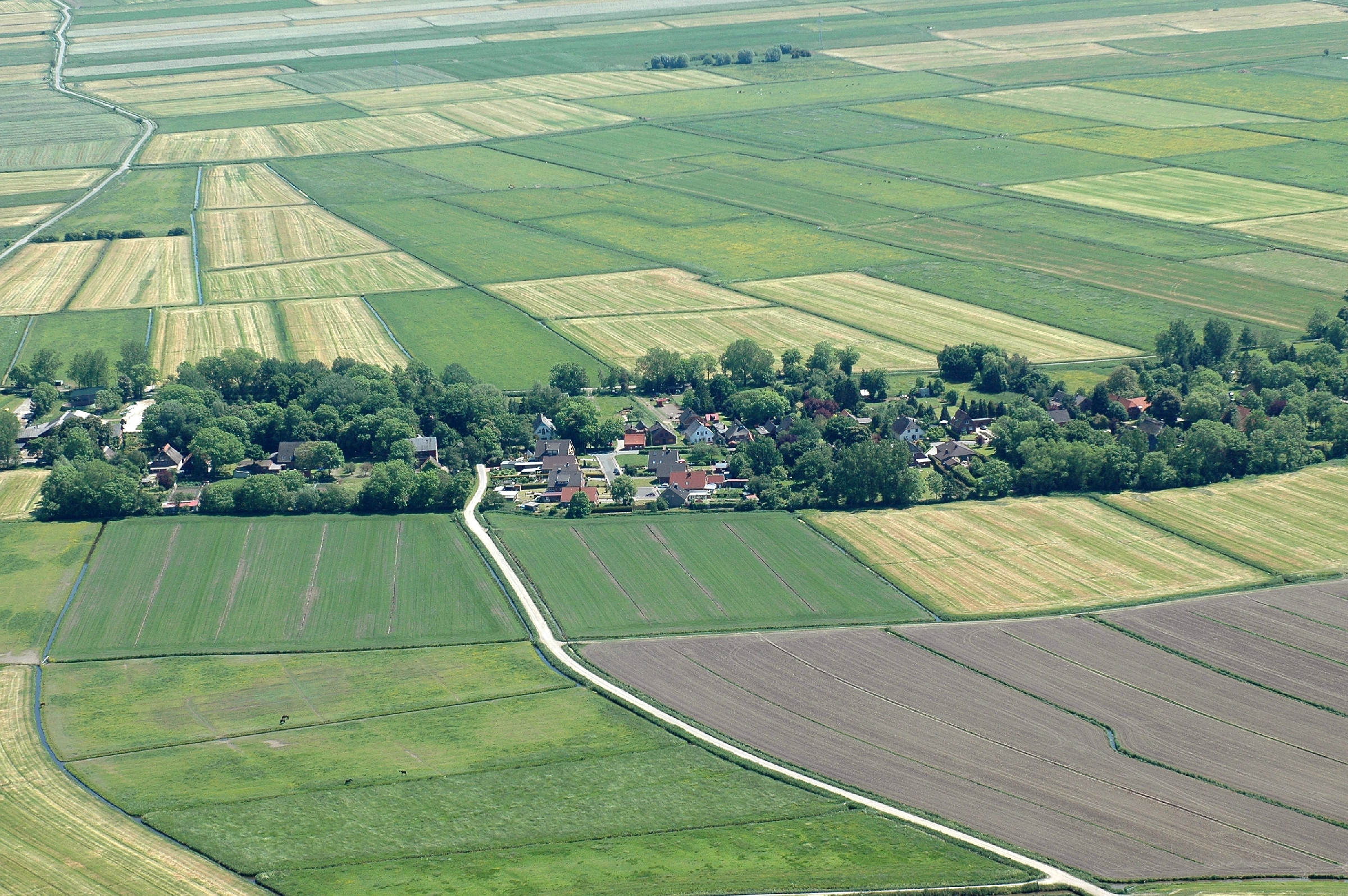 Neuenlande bei Loxstedt. Im Vordergrund der Weg Mittendorf Hellmer, von links nach rechts die Bebauung an der Neuenlander Straße, in den Hintergrund abgehend der Schmedesweg / Reepen. Aus der Serie: Fotoflug vom Flugplatz Nordholz-Spieka über Cuxhaven und Wilhelmshaven